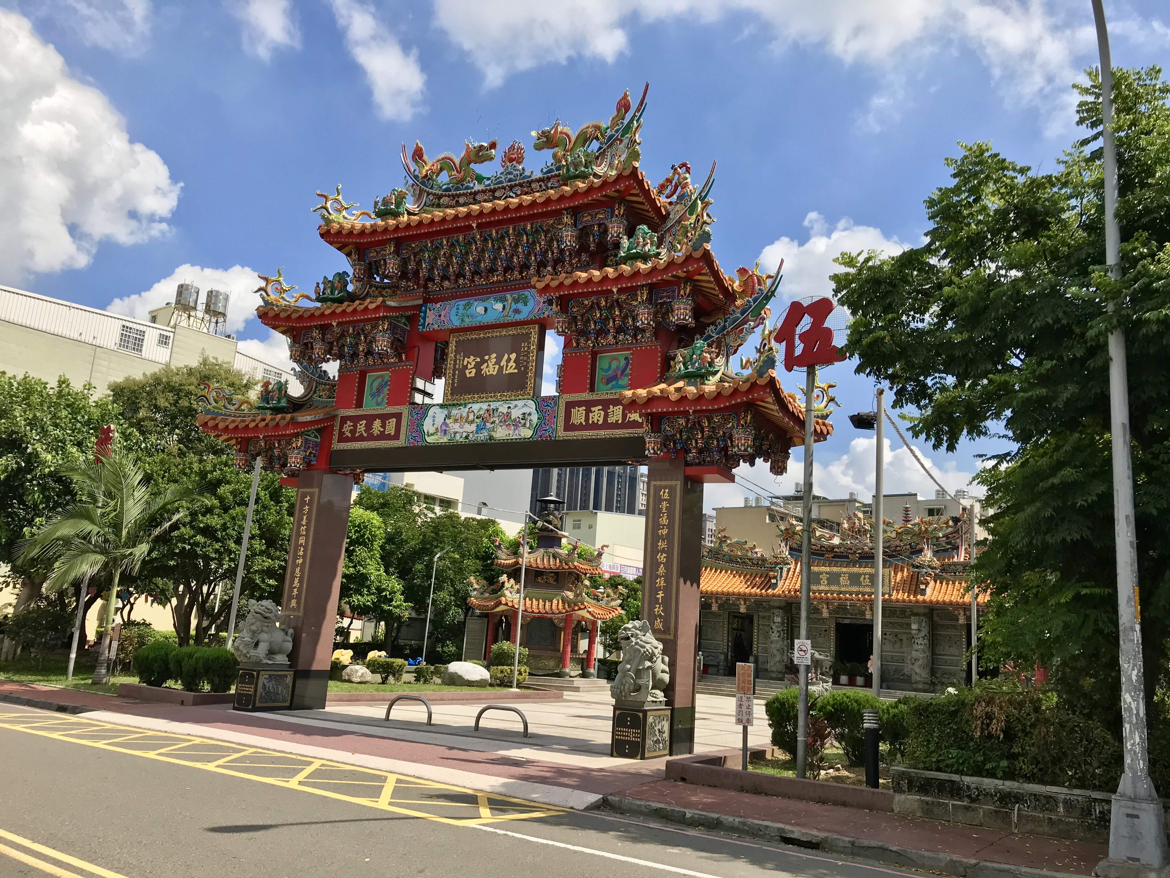 竹北伍福宮牌樓